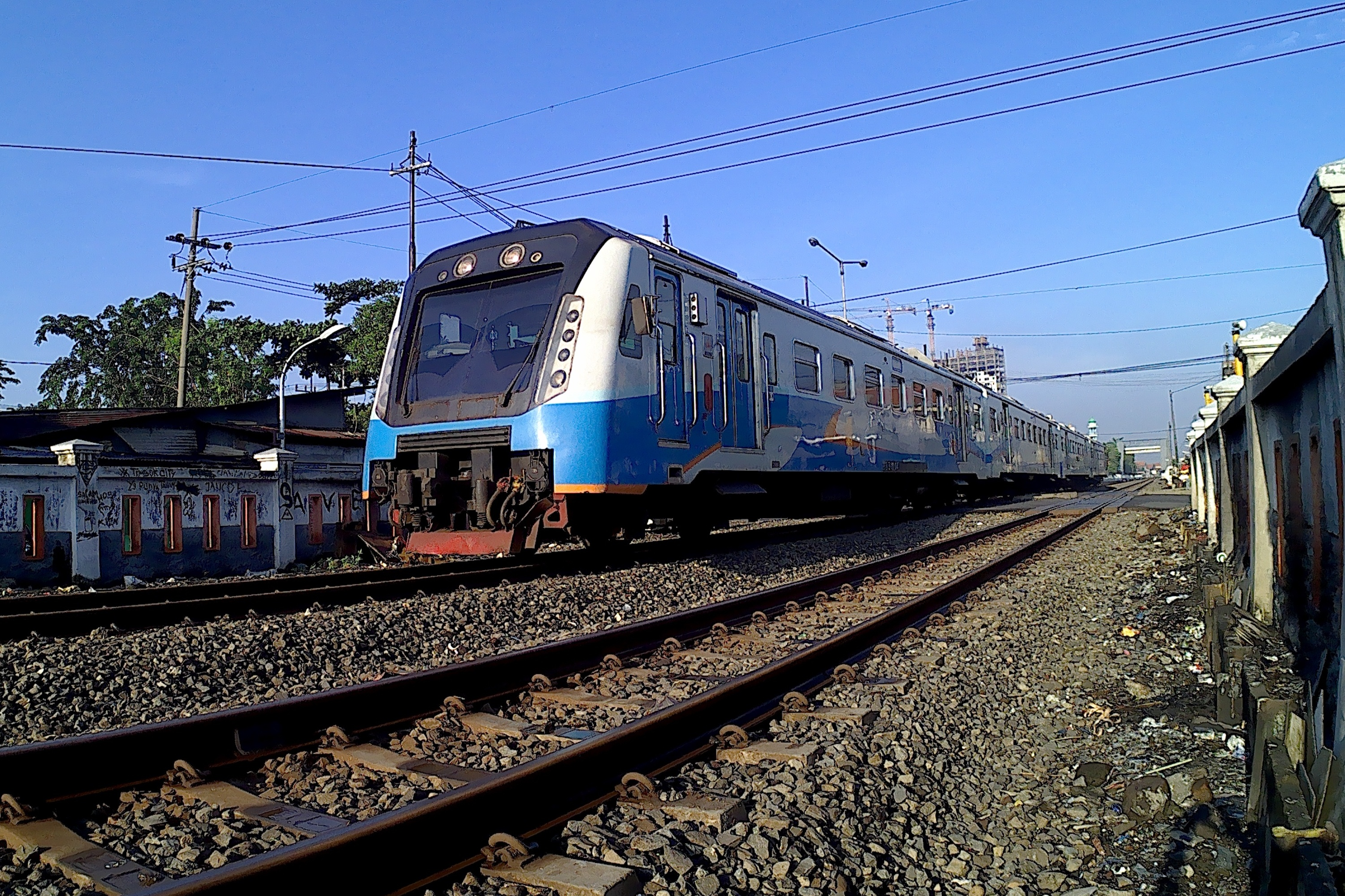 KA Komuter Sulam (Surabaya-Lamongan) menggunakan rangkaian KRDI AC persiapan masuk Stasiun Surabaya Pasarturi.